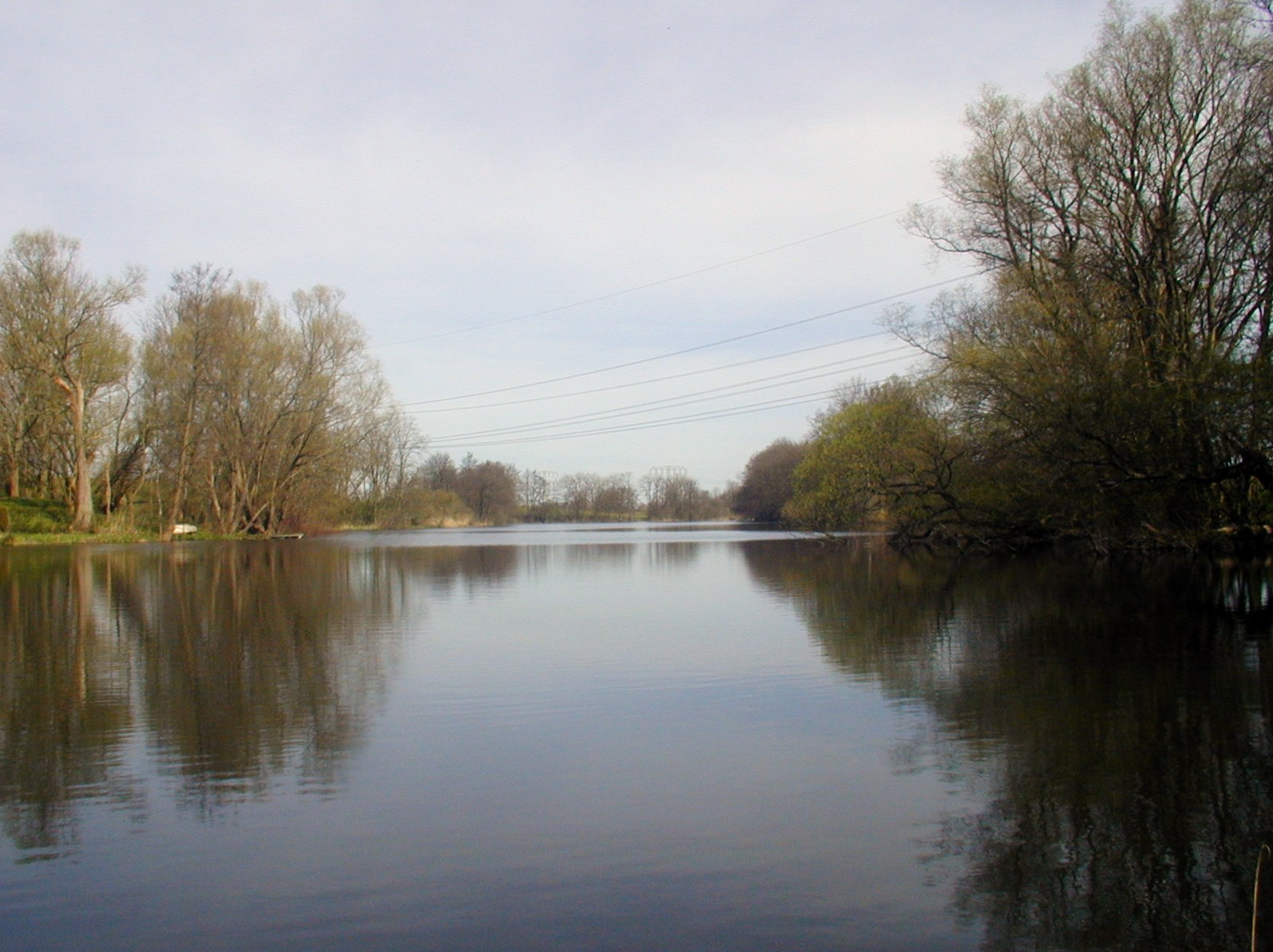 Der Voigdehäger Teich in Voigdehagen ist ein im Mittelalter aufgestautes, fischreiches Gewässer in Voigdehagen.